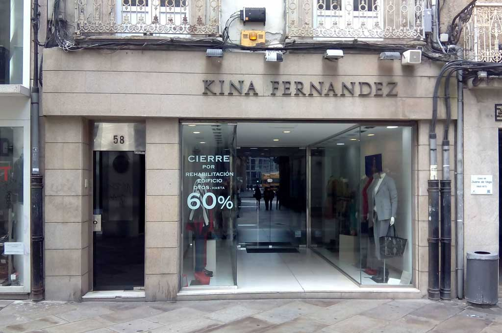 Tenda de Kina Fernández na rúa Real da Coruña.